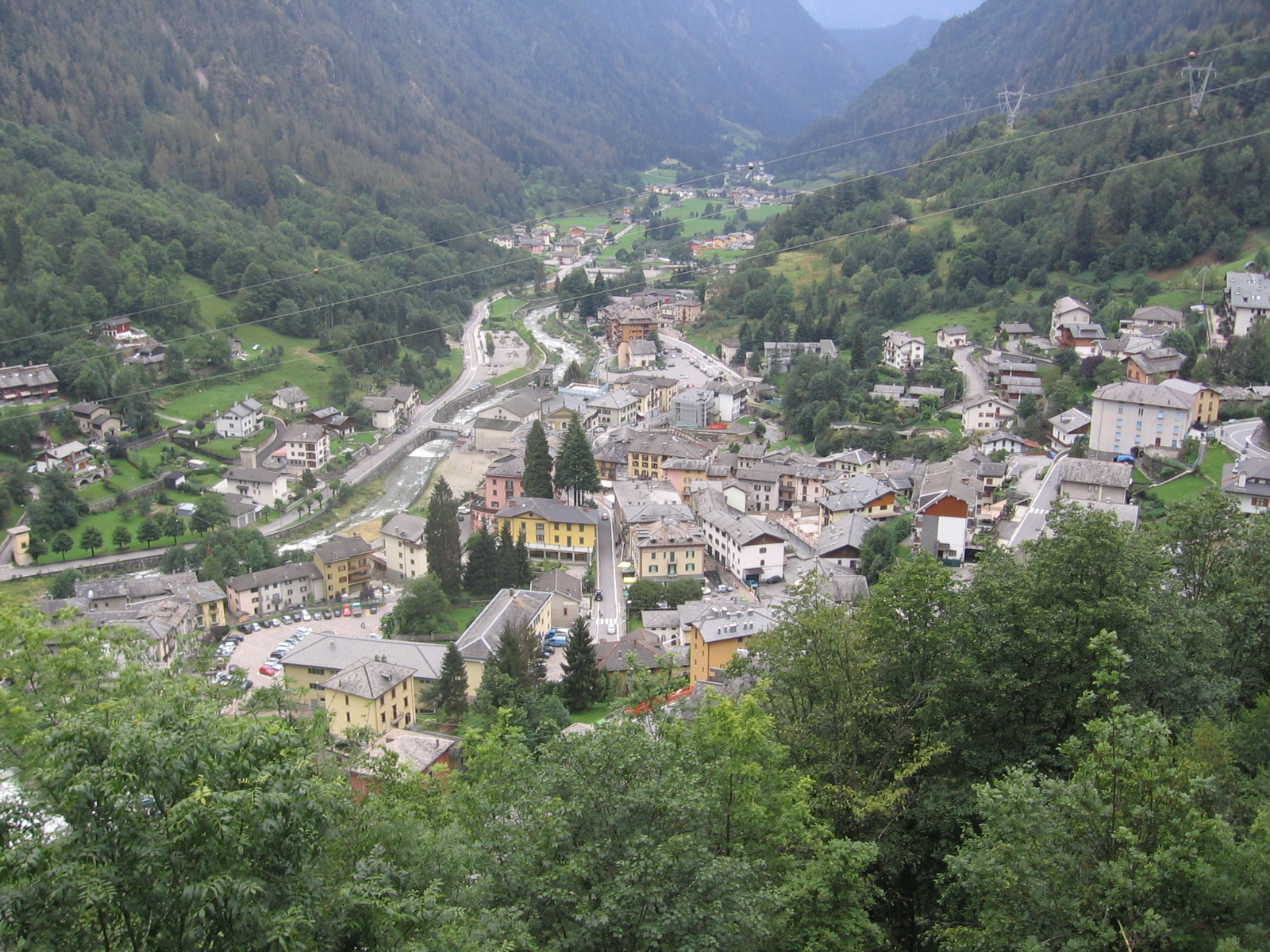 Branzi, Bergamo, Italy